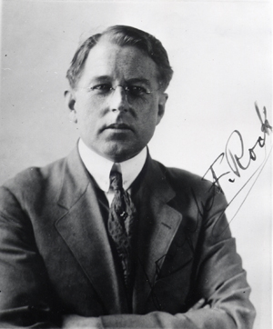 Dr Joseph François Rock, Professeur de Botanique à Hawaii et explorateur, Journaliste au National Geographic